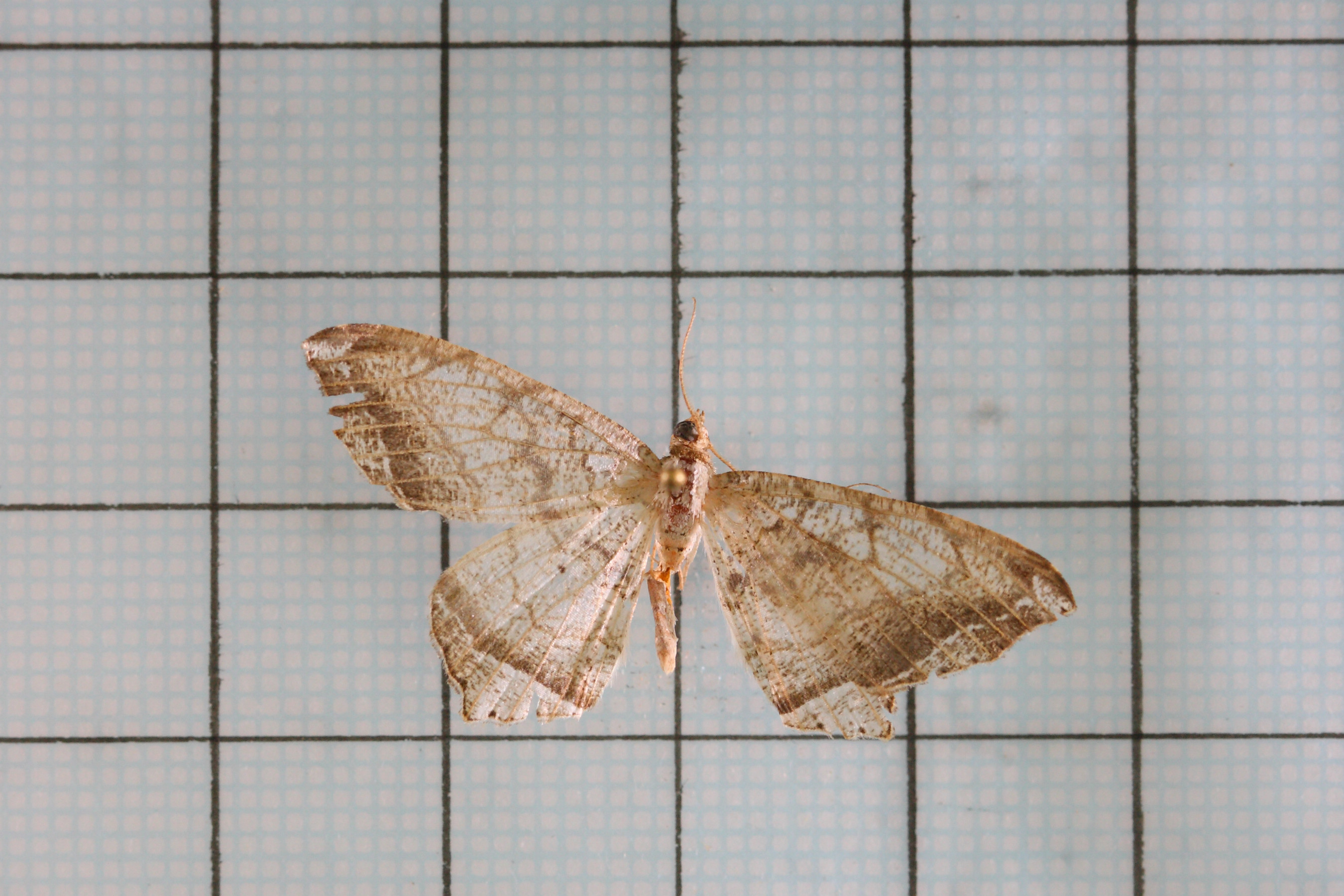 Oxymacaria temeraria (Swinhoe, 1891) 暗邊截翅尺蛾 鞍1:P.22,Pl.3-12 臺灣尺蛾科圖鑑 2:P.102